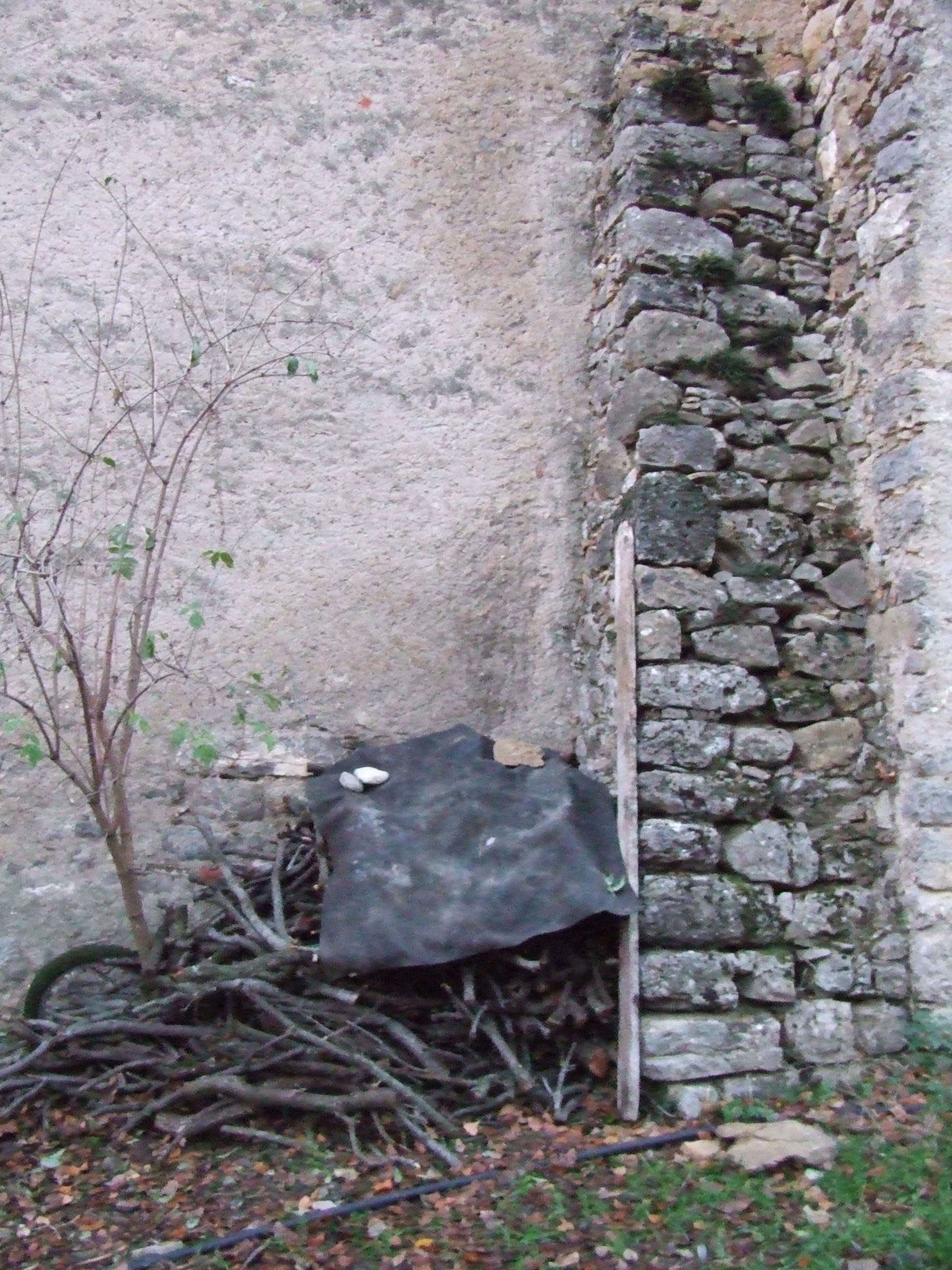 Santa Maria de Mas Palou. Contrafort a ponent (Abella de la Conca, Pallars Jussà)